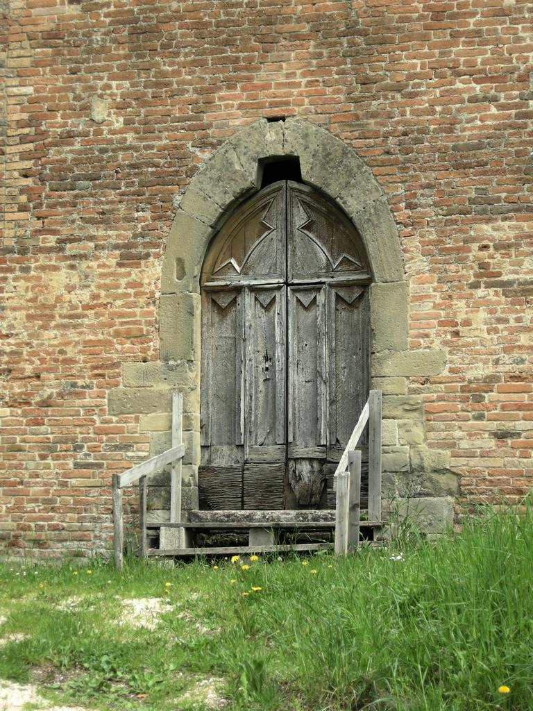 Ancient gate